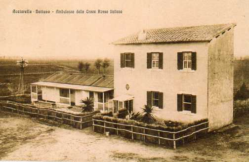 Edificio della scuola